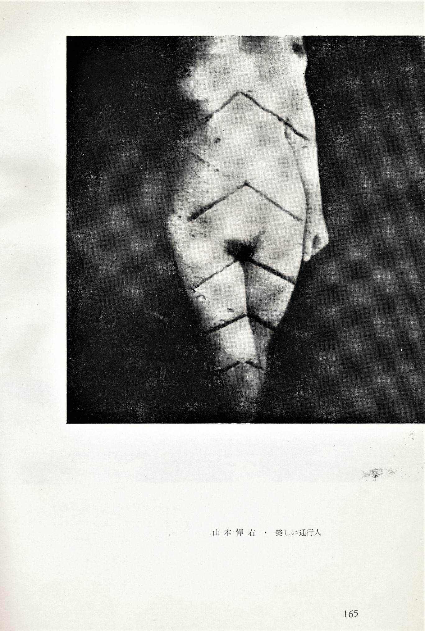 Beautiful Passerby 1956